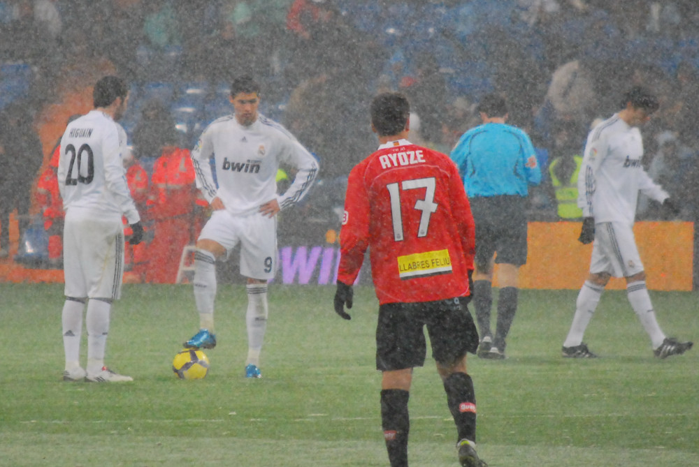 Partido con gran nevada Real Madrid 2 - Mallorca 0 Las fotos no tienen grano, es la nieve